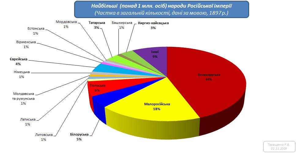 Доля основных народов в Российской империи (1897 г.)